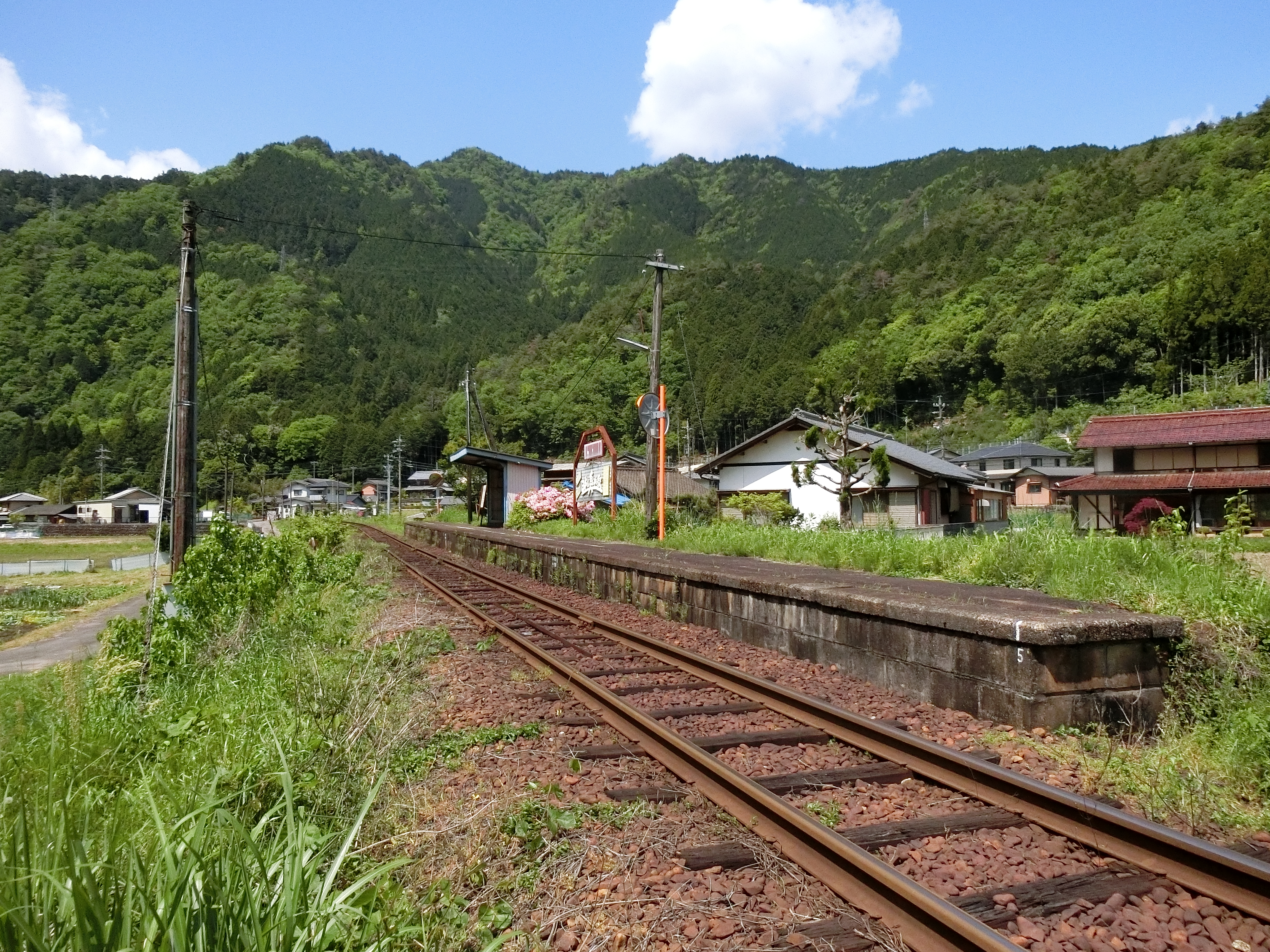 八坂駅 (岐阜県)